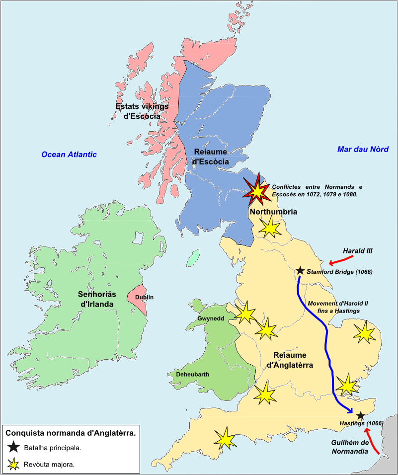 Esquèma de la conquista normanda d'Anglatèrra.